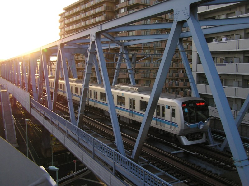 05/5/3投稿者撮影 撮影場所 南砂町―西葛西 05-142F 東京メトロ1周年記念ヘッドマーク付